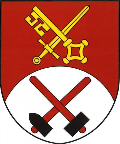 Bílý Kámen, znak obce